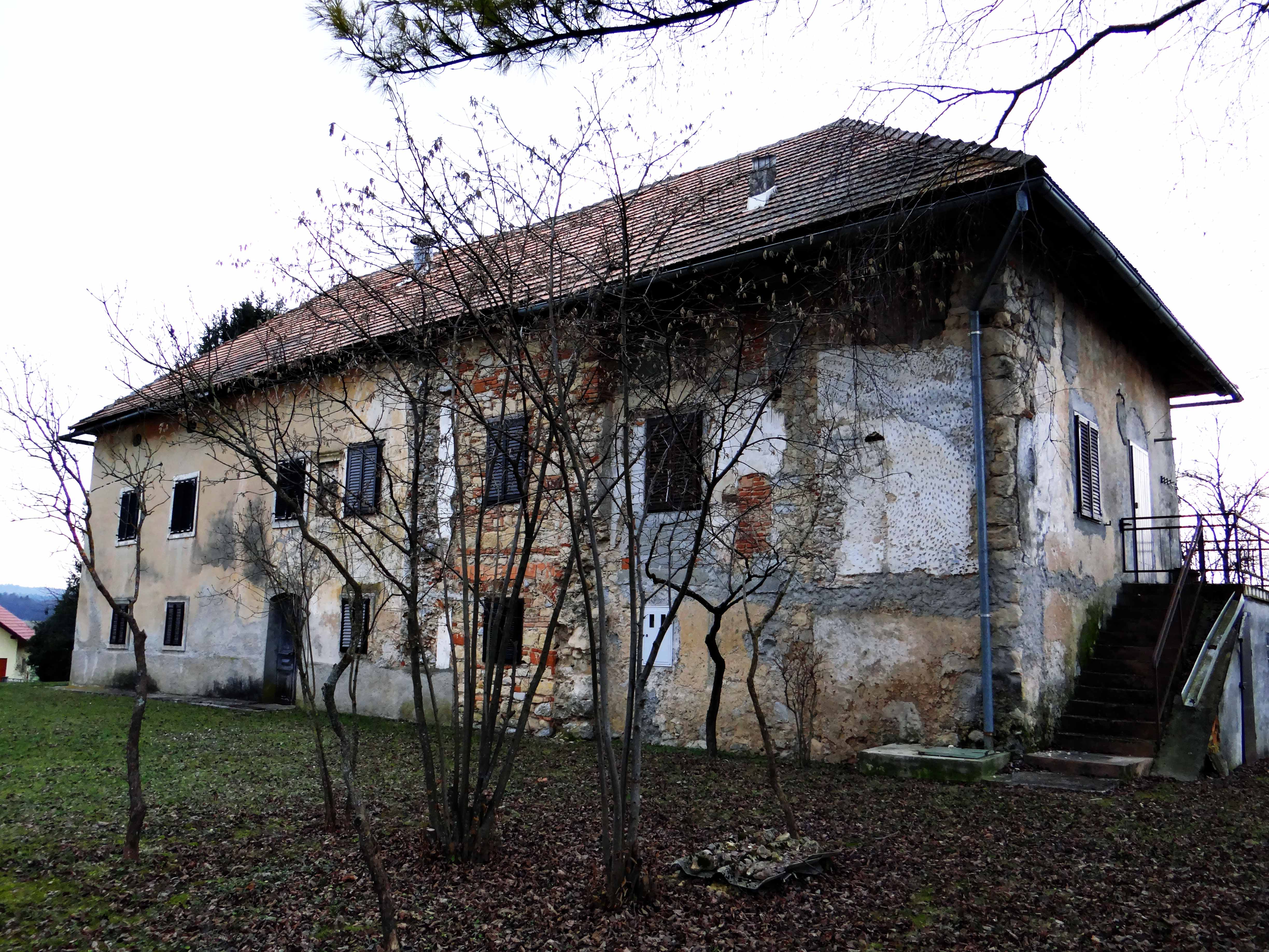 Dvorec Volavče I. (Wollautsche), Gorenje Mokro Polje